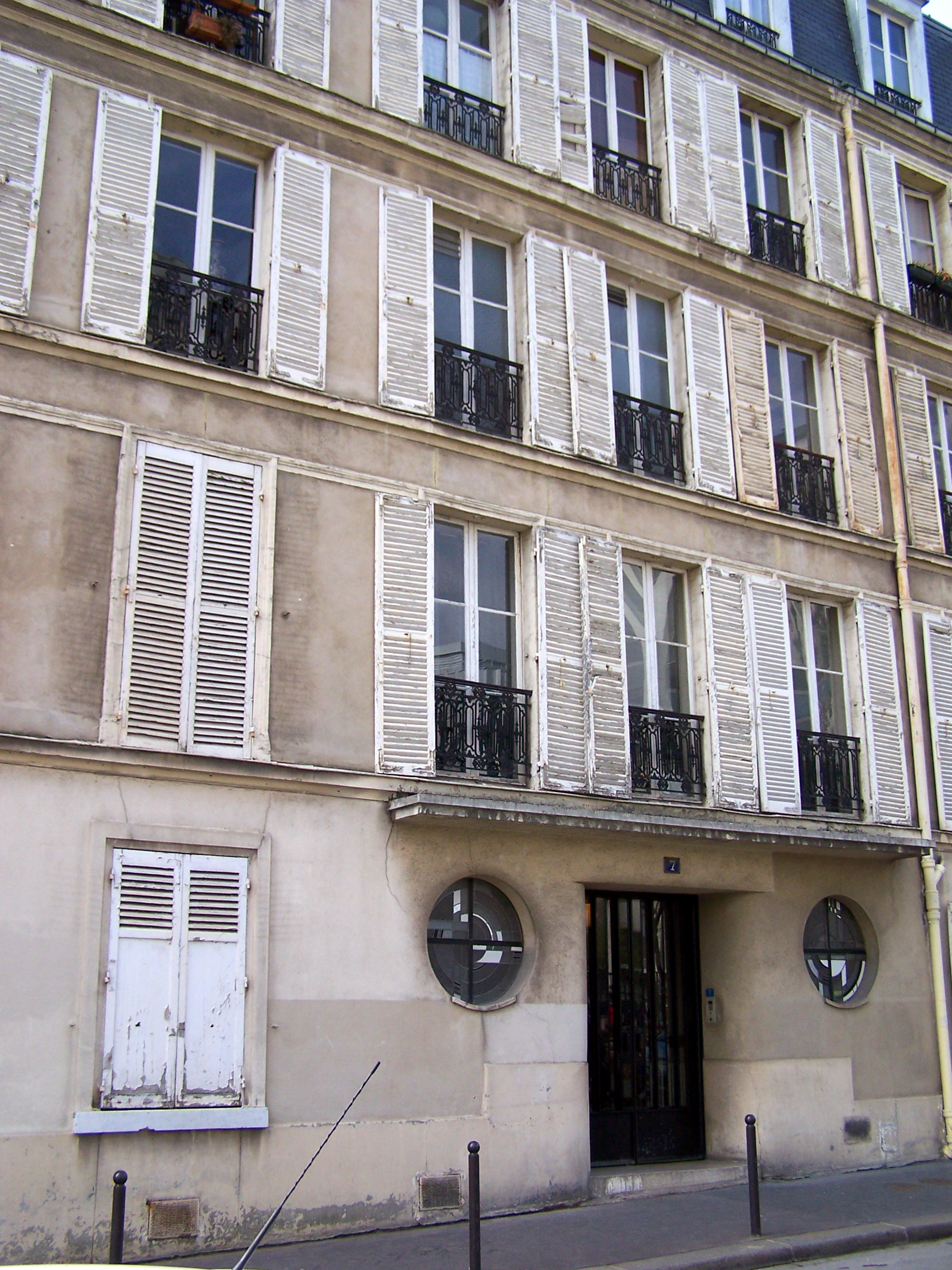 Vue de l'immeuble au numéro 7 de la rue Méchain où vécut et travailla notamment Tamara de Lempicka. Le hall de l'immeuble ancien sur la rue, avec ses oculi, est l'œuvre de Robert Mallet-Stevens.